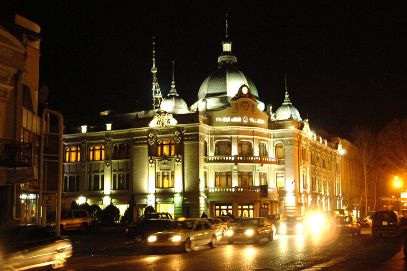 TBC Bank in Tbilisi